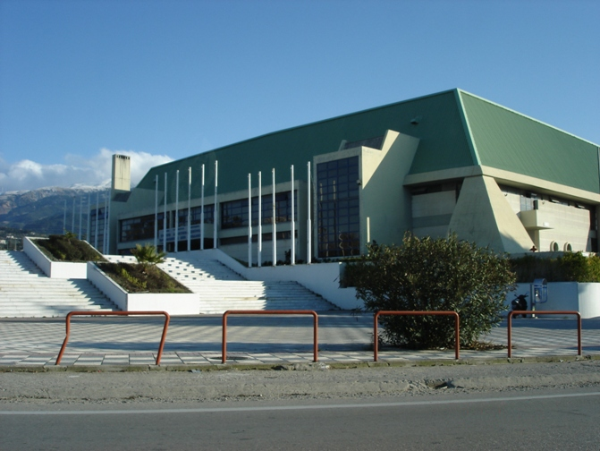 Palai de Spor Patras Dimitris Tofalos Greece Παλαί ντε σπορ Πάτρας "Ολυμπιονίκης Δημήτριος Τόφαλος" .